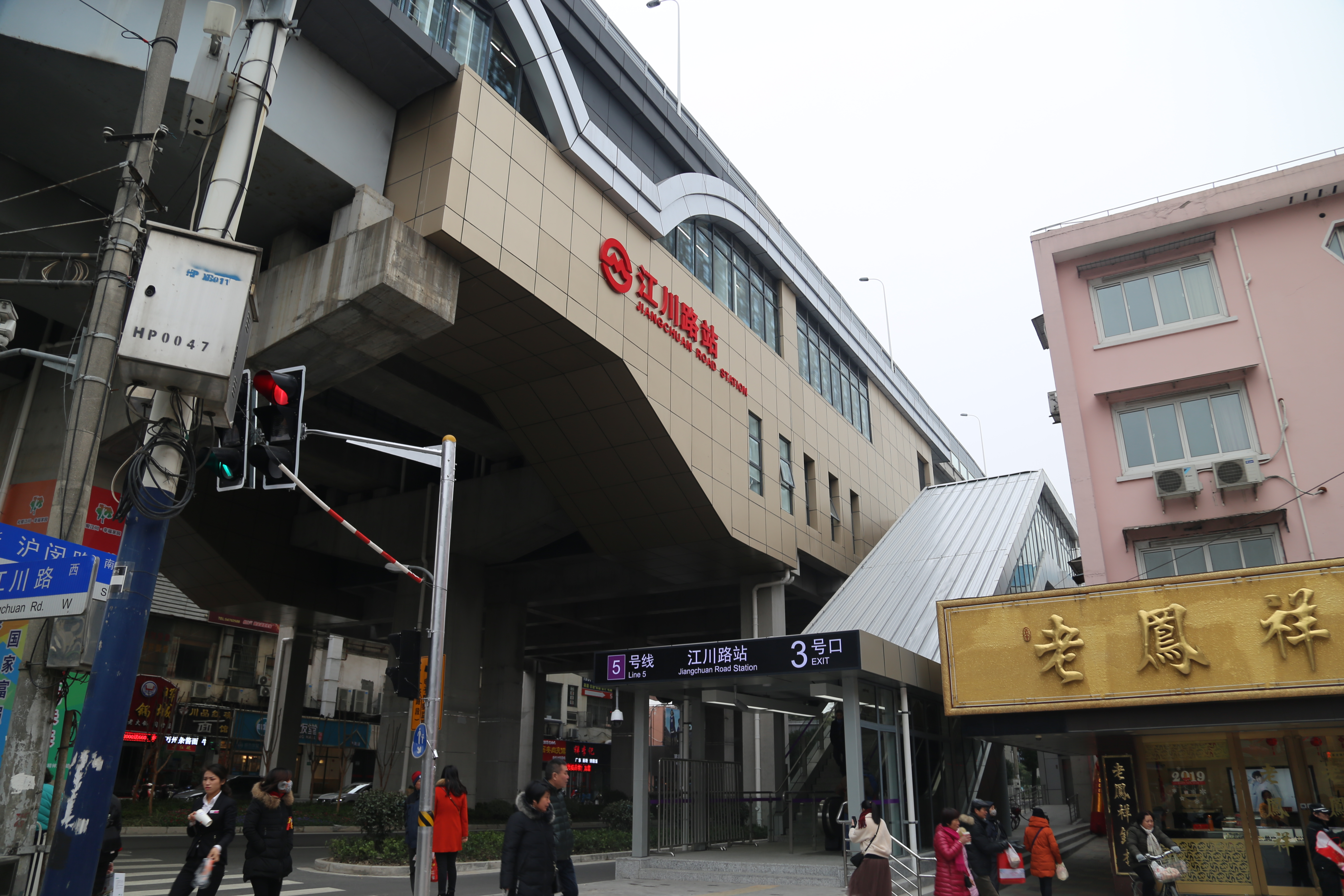 江川路站站房